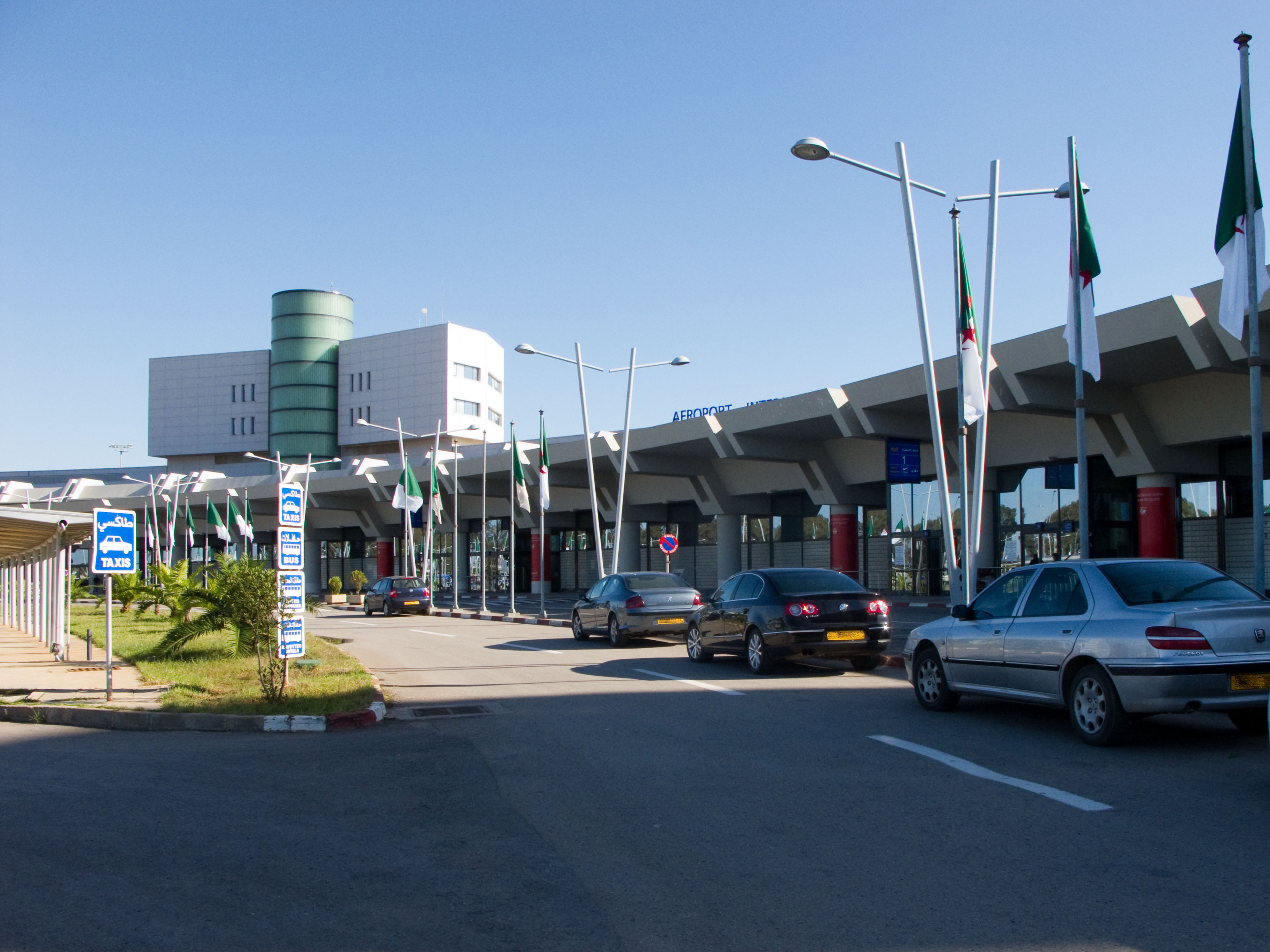 Aéroport Houari Boumediene, Dar El Beida, Alger, Algérie (nouvel aérogare)